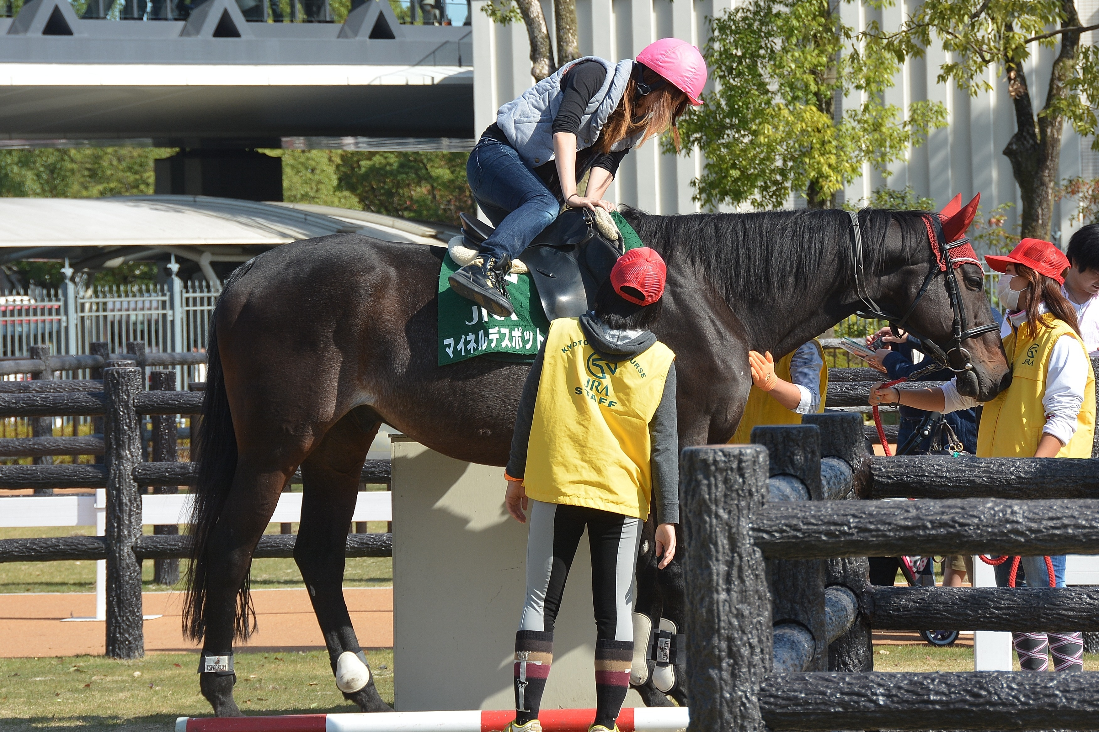 2015年10月25日に京都競馬場で、乗馬を行っているマイネルデスポットを、ホースリンク（体験乗馬エリア）で撮影したもの。